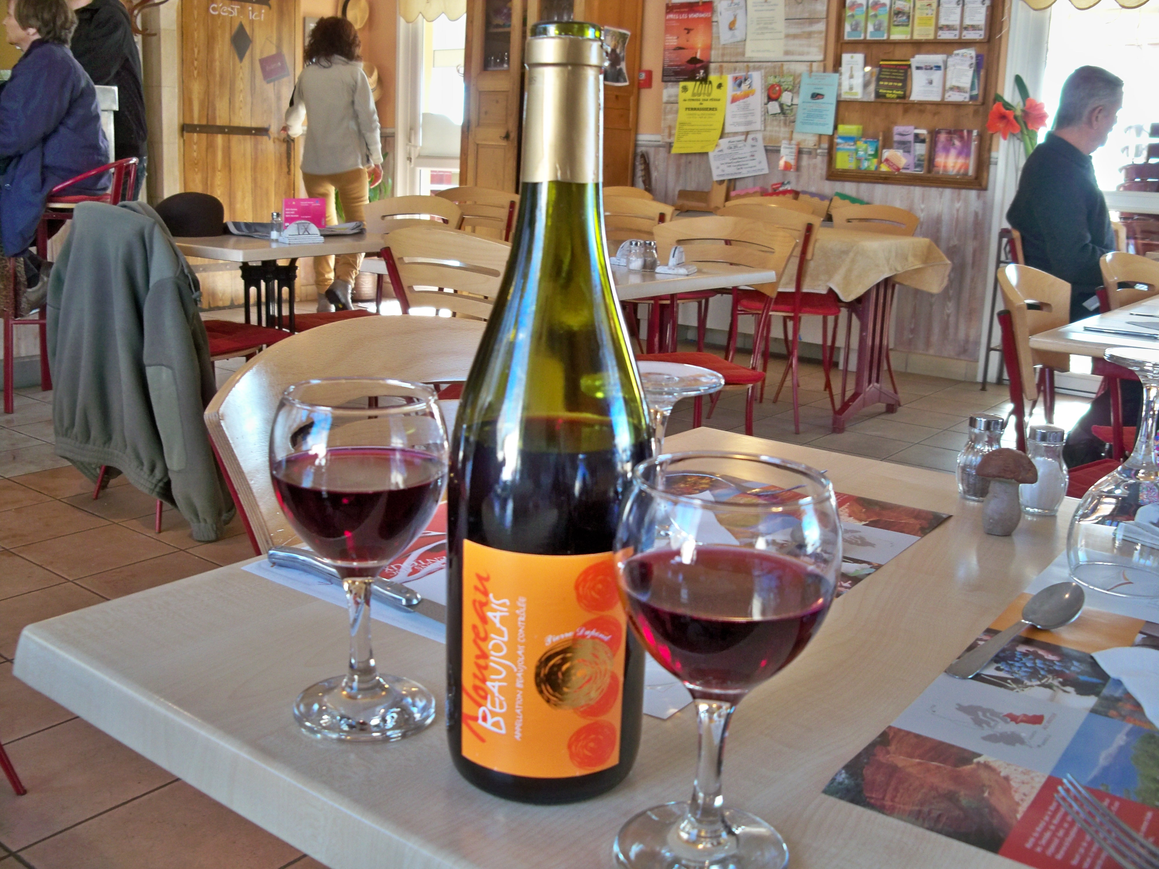 Beaujolais nouveau au Bistrt de Pays de Saint Trinit, Vaucluse, France